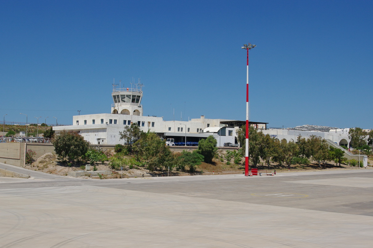 Terminal Flughafen Santorini